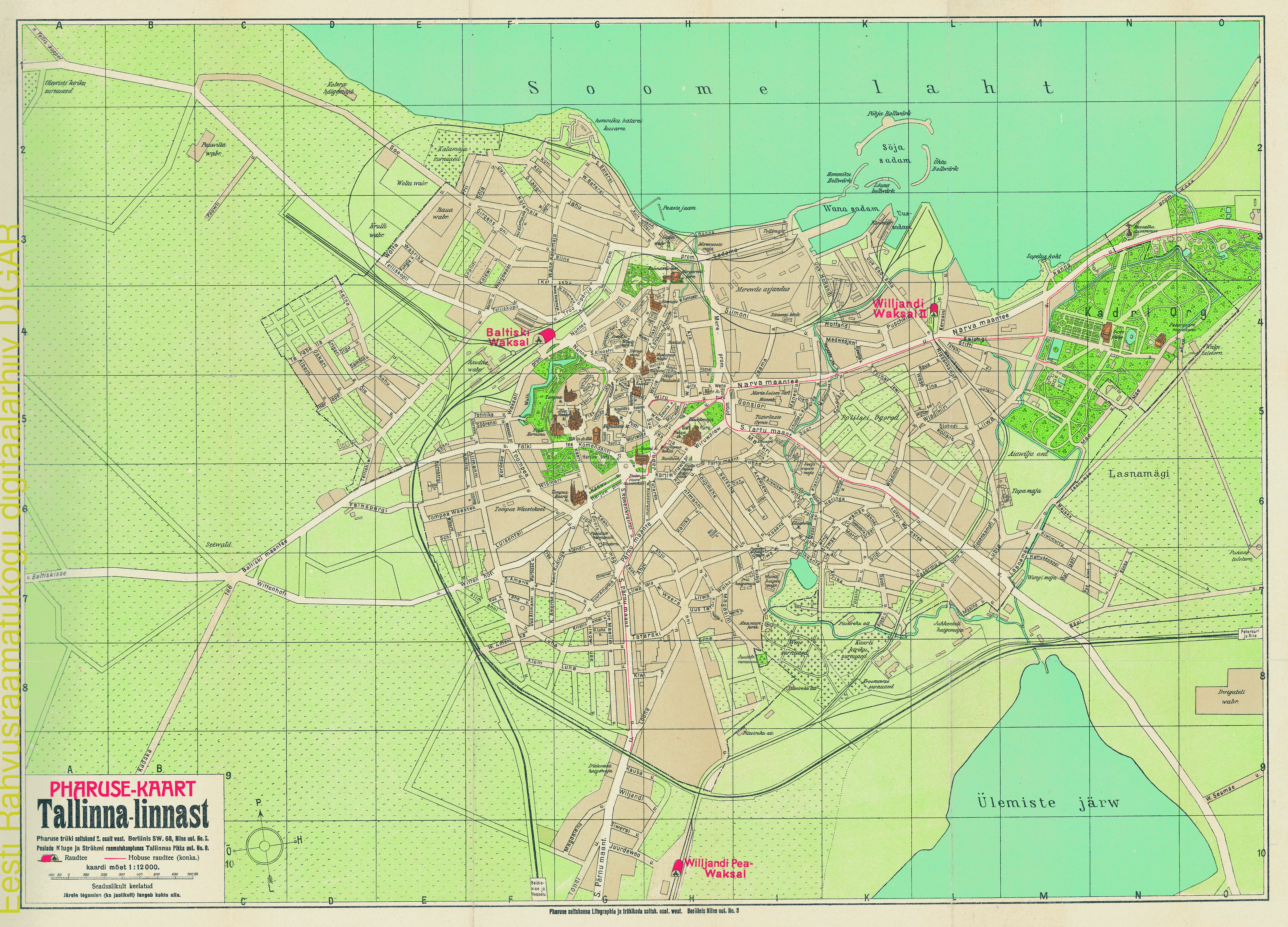 Pharuse kaart Tallinna linnast